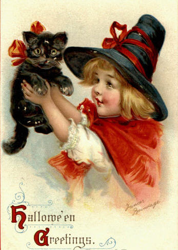 Halloweengrußkarte von Frances Brundage.